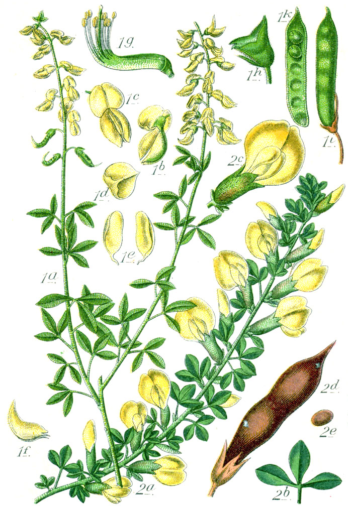 1. Cytisus nigricans L. 2. FloraWeb.de: Regensburger Geißklee, Chamaecytisus ratisbonensis (Schaeff.) Rothm. Unresolved names: Genista nigricans (L.) E.H.L.Krause, Genista ratisbonensis (Schaeff.) E.H.L.Krause Original Caption 1. Schwarzer Geissklee, Genista nigricans 2. Regensburger Geissklee, G. ratisbonensis